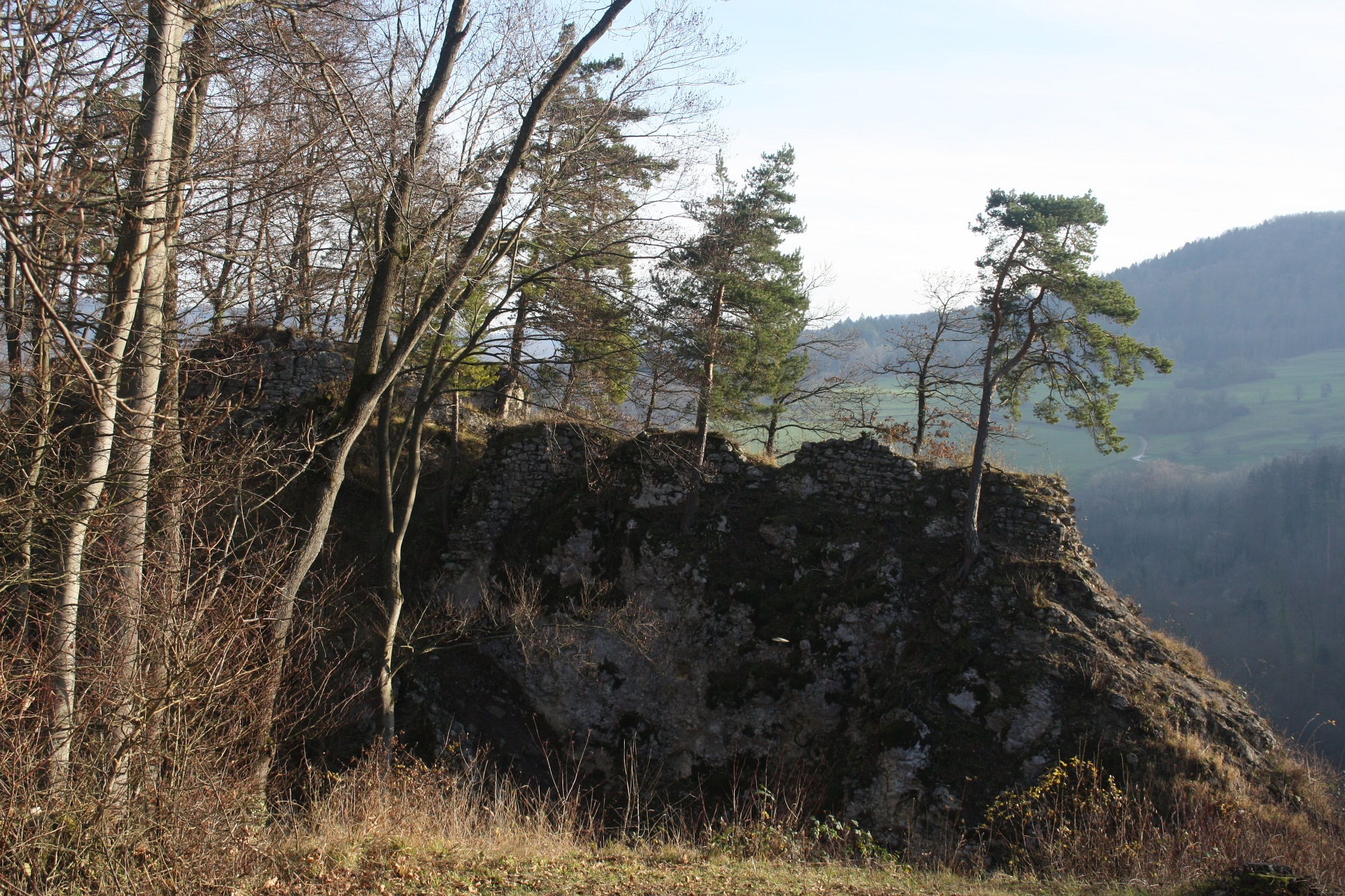 Ruine Frohberg, Aesch, Basel-Land, Schweiz